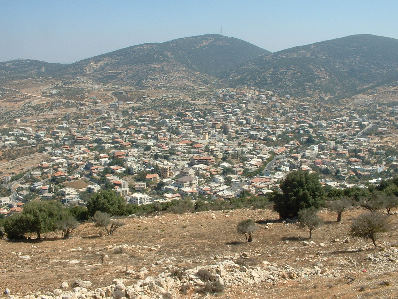 חורפיש - מראה כללי מנבי סבלאן